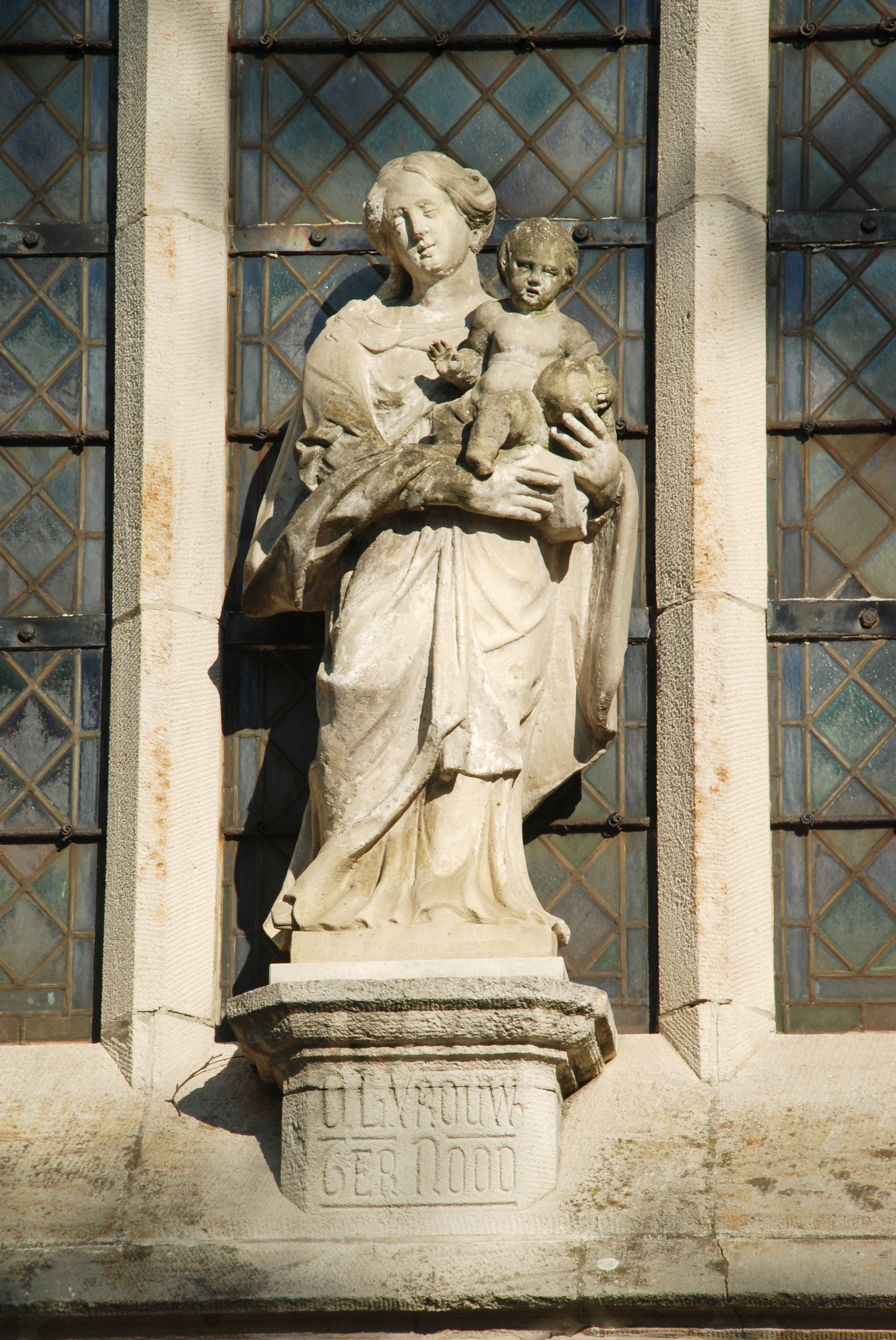 Belgique - Bruxelles - Uccle - Chapelle de Stalle